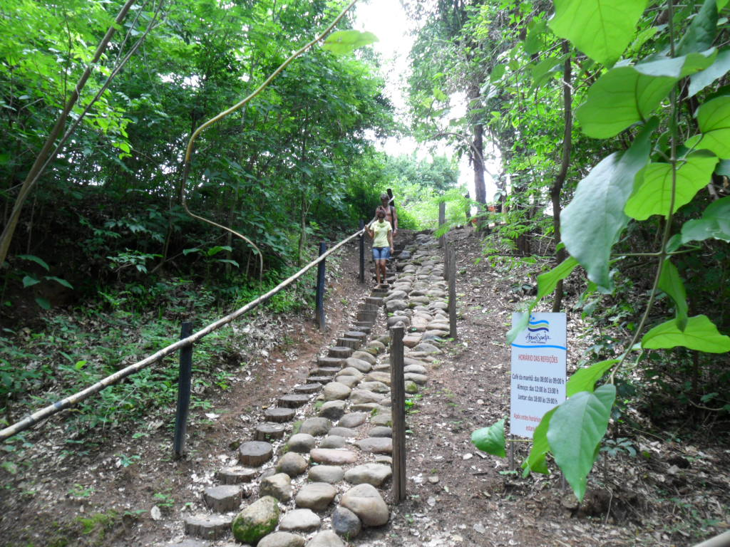 caminho pra chegar nas aguas